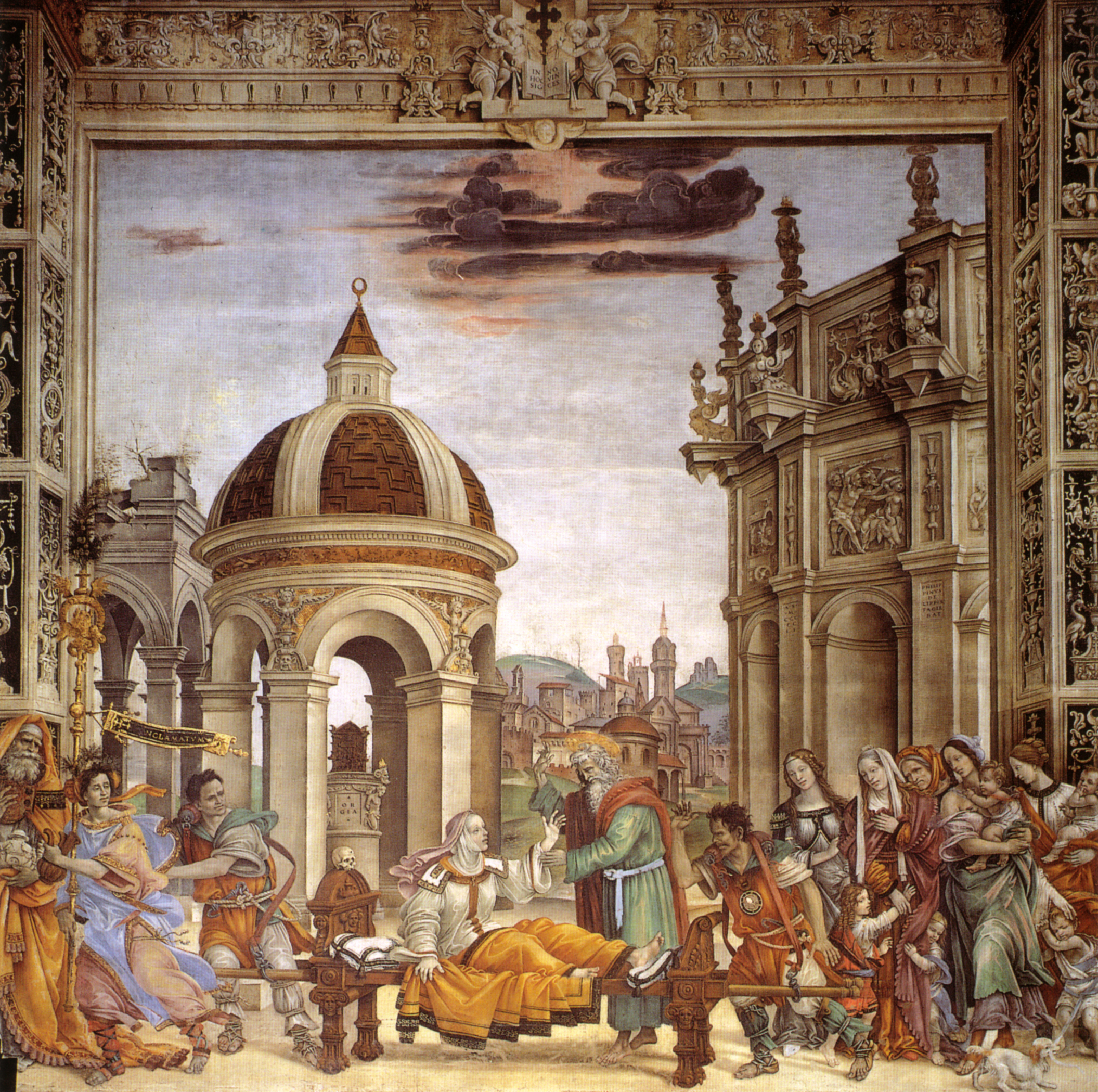 LIPPI, Filippino Fresco Strozzi Chapel, Santa Maria Novella, Florence